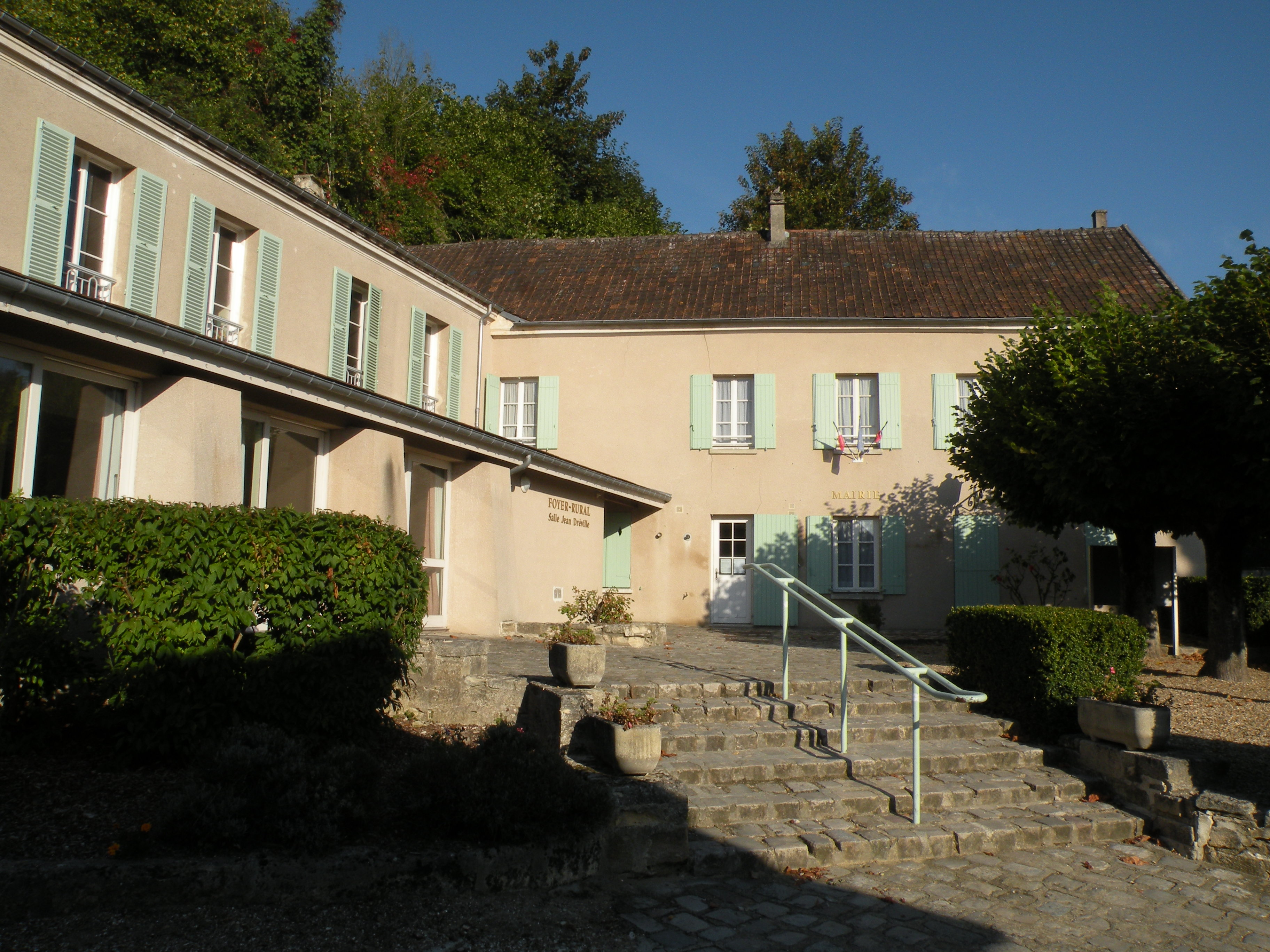 mairie de Vallangoujard